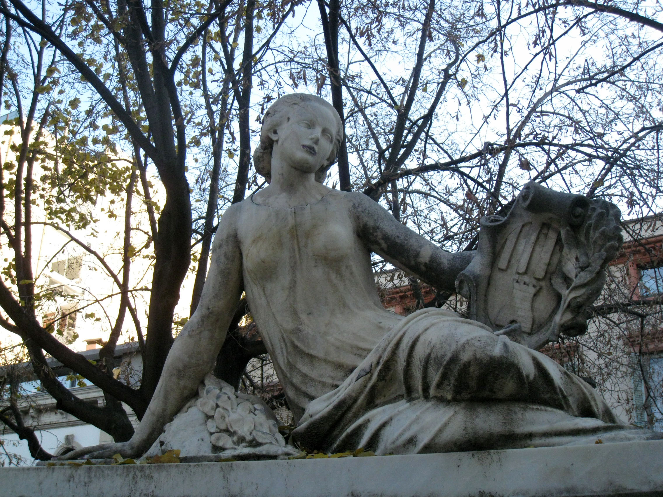 Monument a Alfons Sala, comte d'Ègara, al passeig del Comte d'Ègara (Terrassa). Escultura de Frederic Marès (1950). Detall de l'estàtua femenina que corona el monument, la qual aguanta un escut de la ciutat.